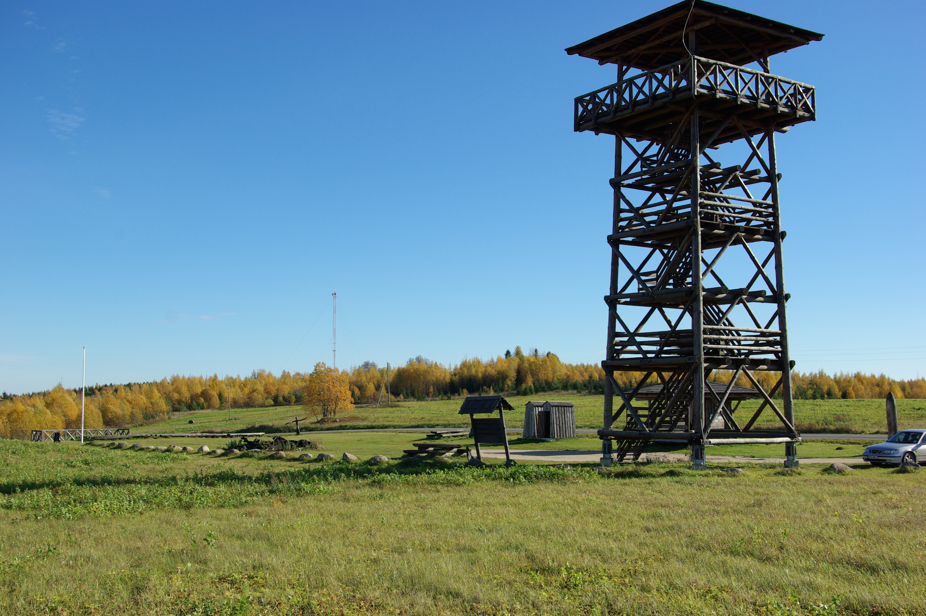 Vaade Meremäe mäele